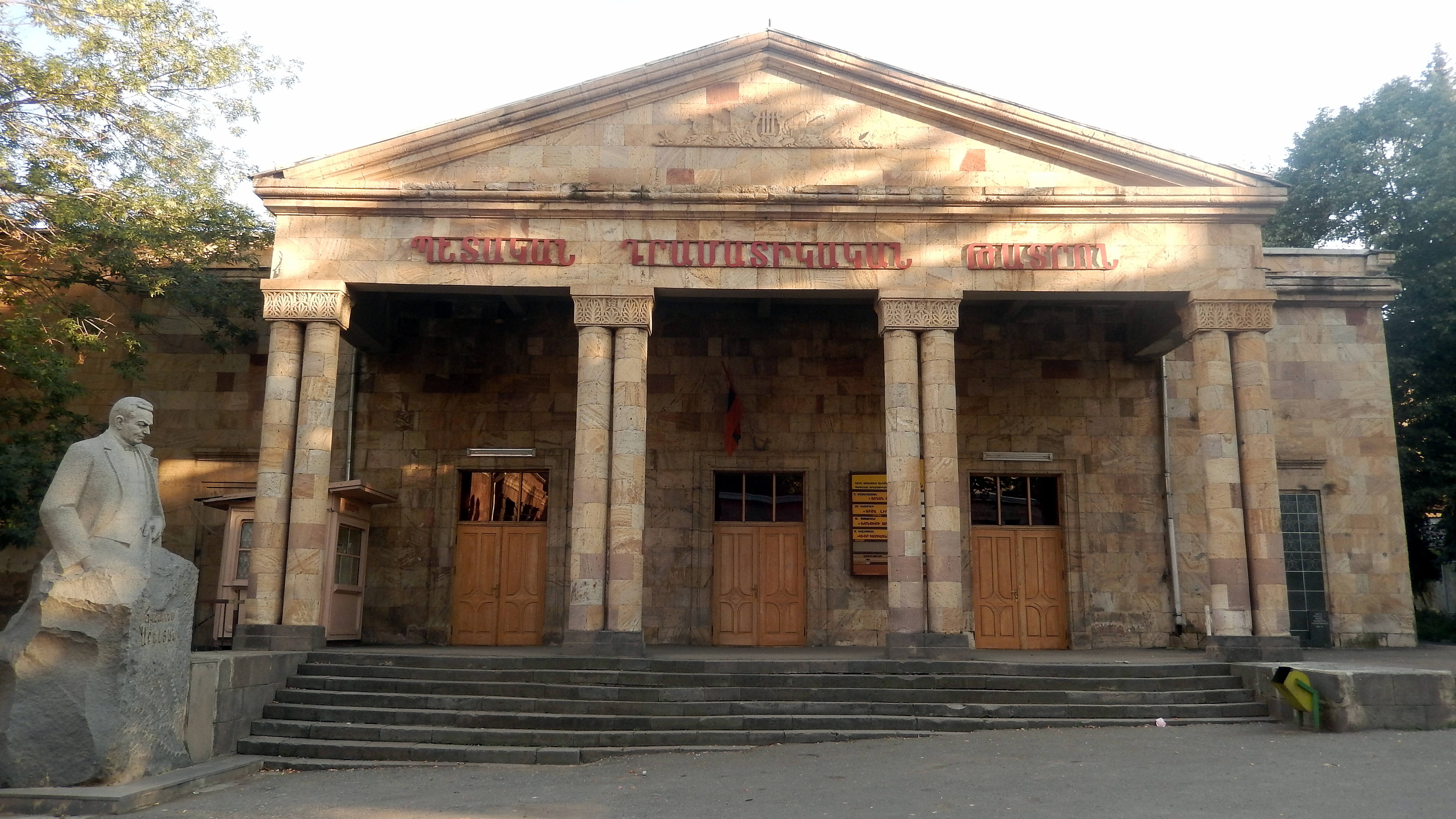 Վանաձորի Հովհաննես Աբելյանի անվան դրամատիկական թատրոն